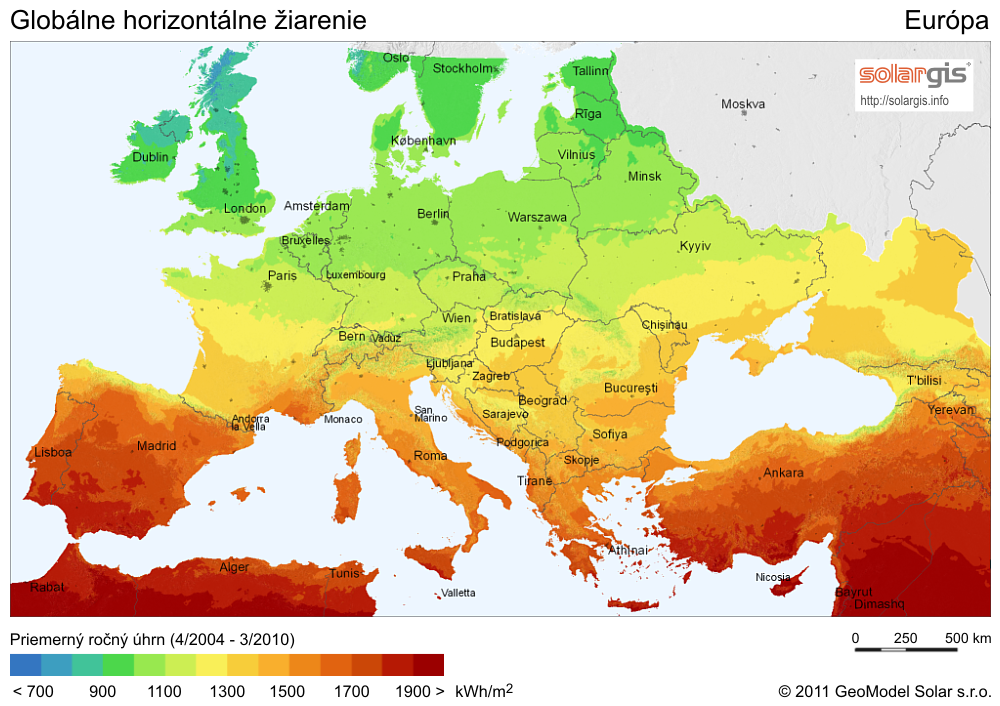 Solar Radiation Map of Europe – Globálne horizontálne žiarenie v Európe, SolarGIS 2011